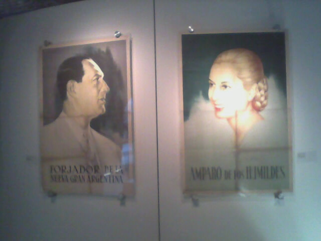 Retrato De Eva Perón y Juan Domingo Perón